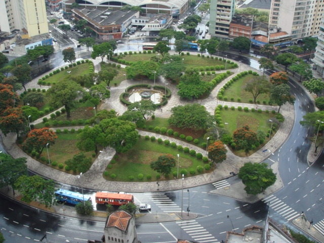 Praça Raul Soares